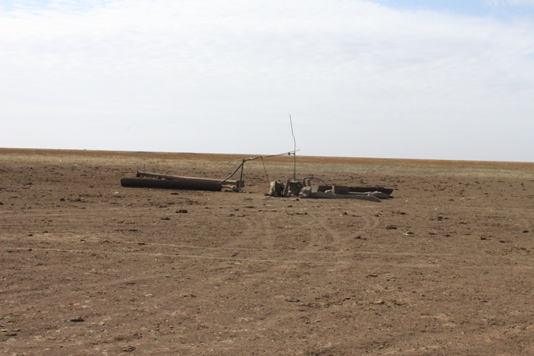 Скотопоилка